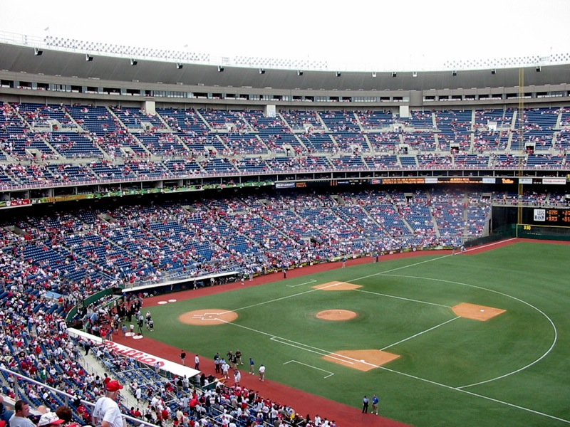 See Veterans Stadium implode - visit